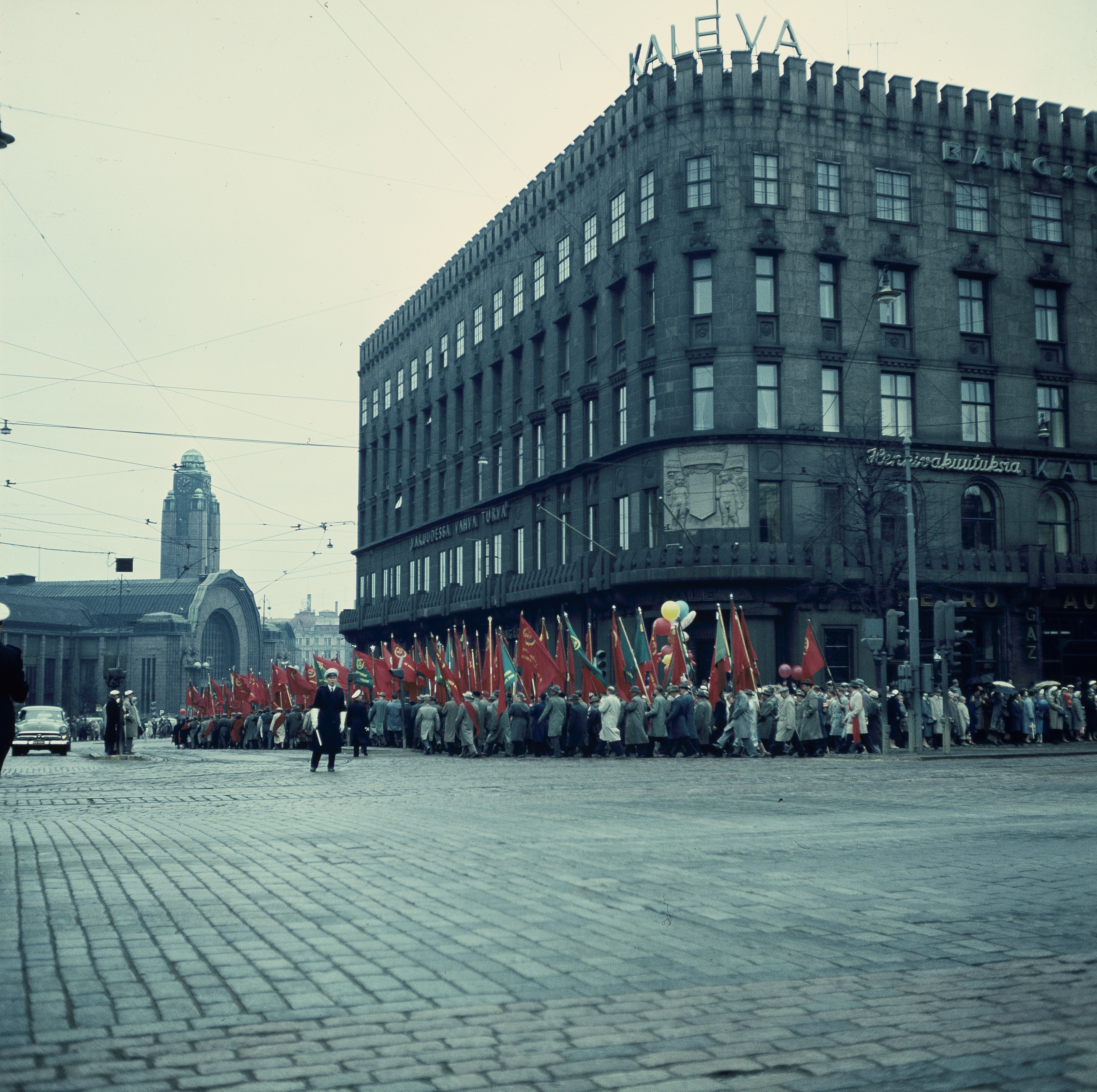 SKPn vappumarssikulkue Kaivokadulla 1.5.1960